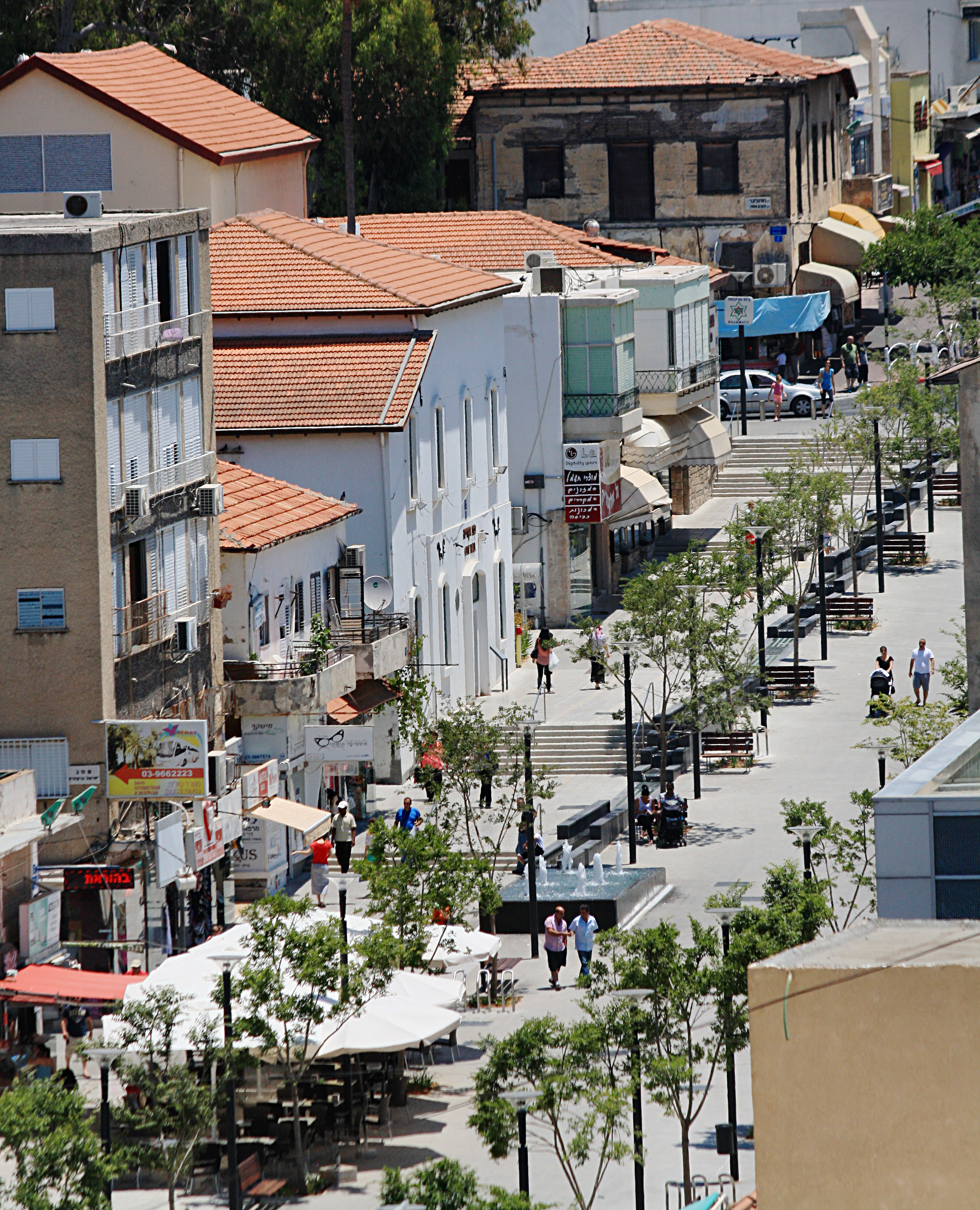 "המדרחוב" של ראשון לציון - קטע מרחוב רוטשילד בין רחוב הרצל לרחוב מוהליבר. בתמונה נראה המדרחוב במתכונתו החדשה, לאחר שזכה לתכנון חדש ושיפוץ בשנת 2013. הבית הלבן במרכז הוא בית העיריה הישן (במקור בית הרופאים). הבית המוזנח במעלה התמונה הוא בית הפקידות הראשון.